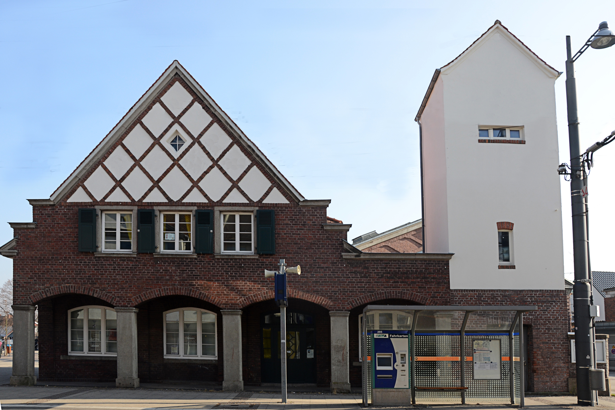 Denkmalgeschützte Gebäude in Darmstadt-Arheilgen, Frankfurter Landstraße 149 Details